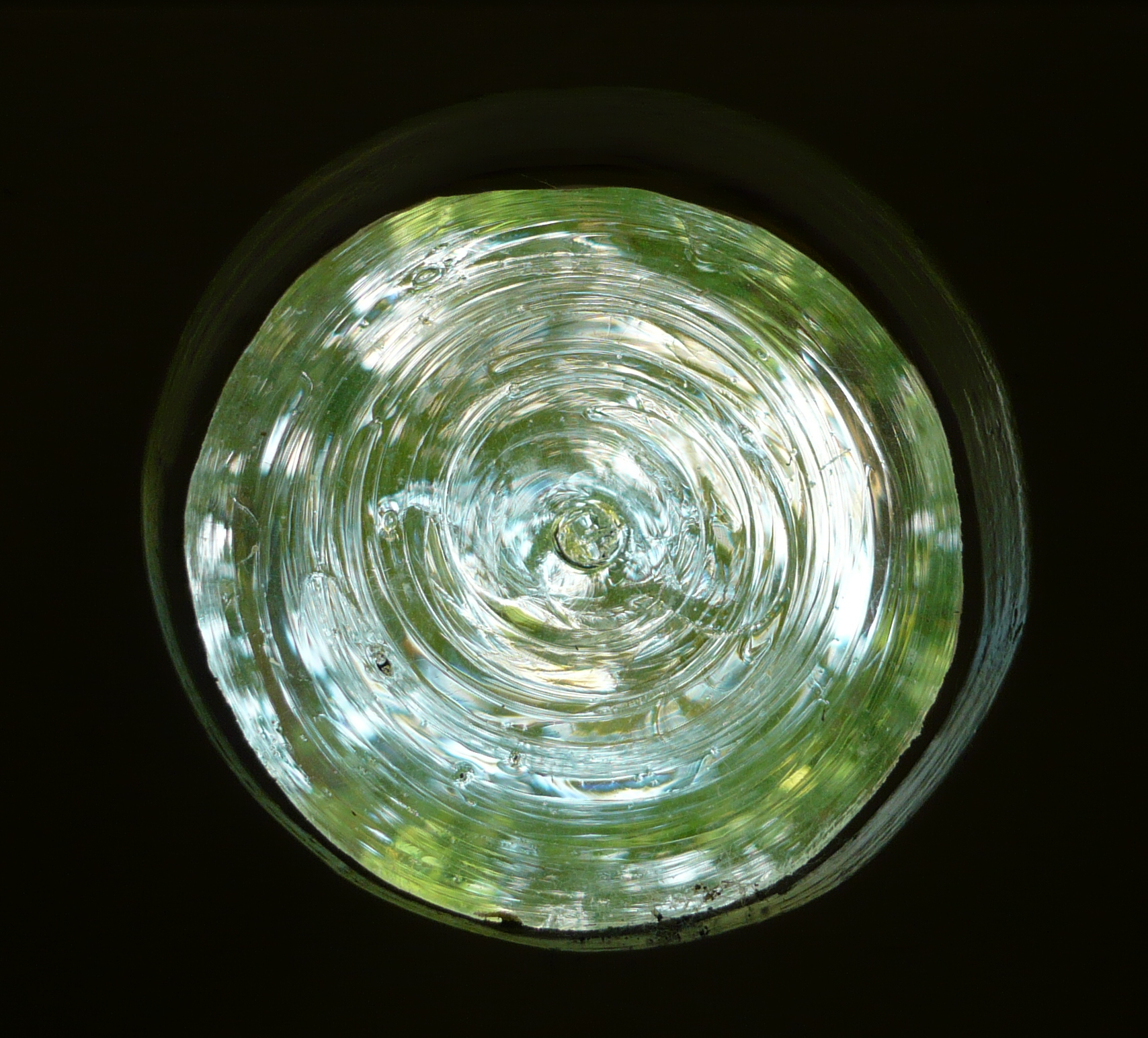 Hamtoren detail kroonglas/maanglas of schijvenglas, doorsnee glasschijf circa 20 cm. 92″ N, 4° 59′ 44.05″ E